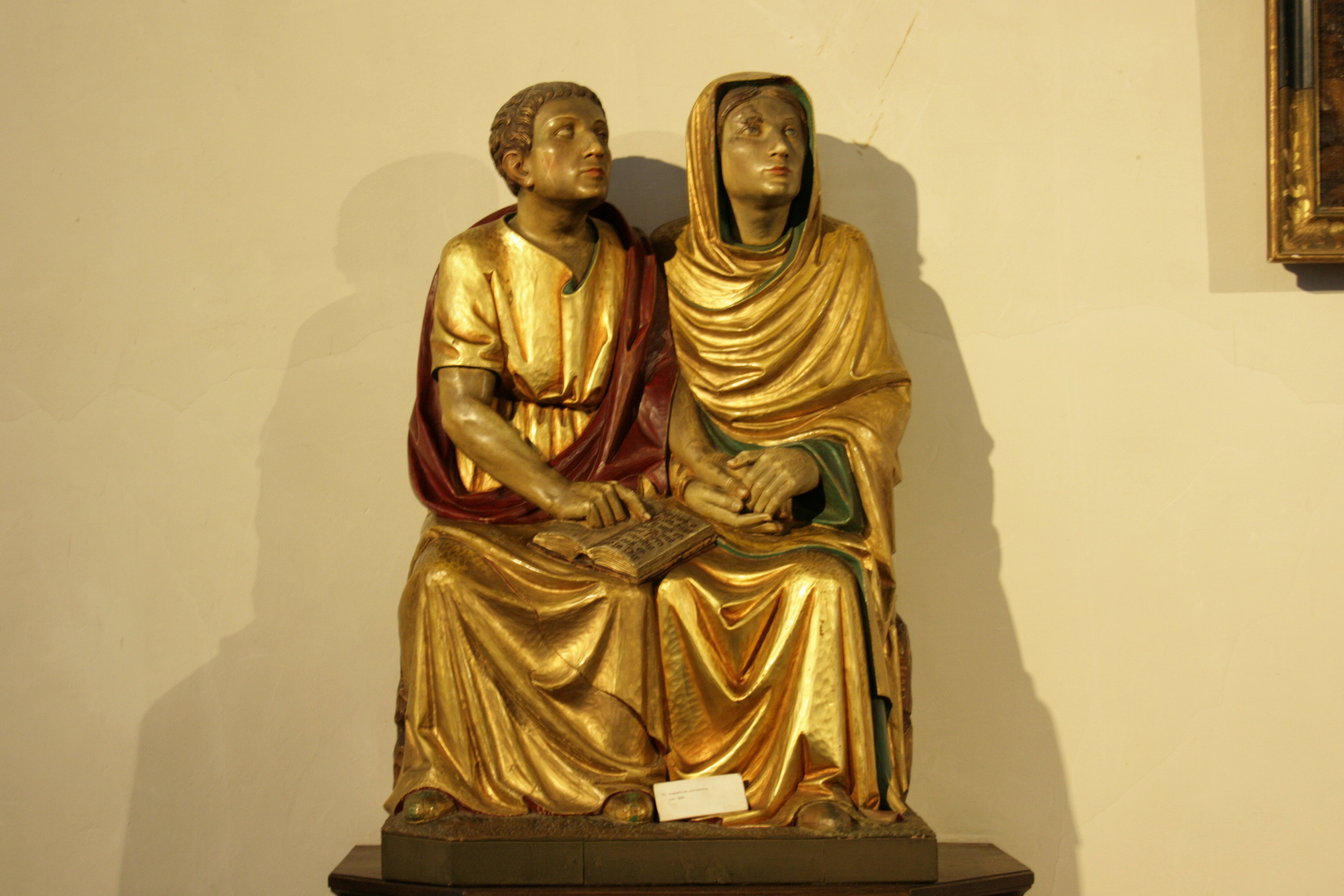 Sankt Martini in Emmerich am Rhein